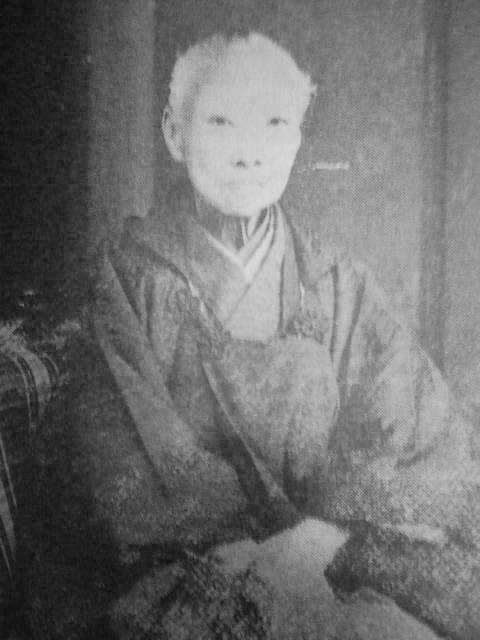 土佐藩士・武市半平太の妻・富子の晩年の写真